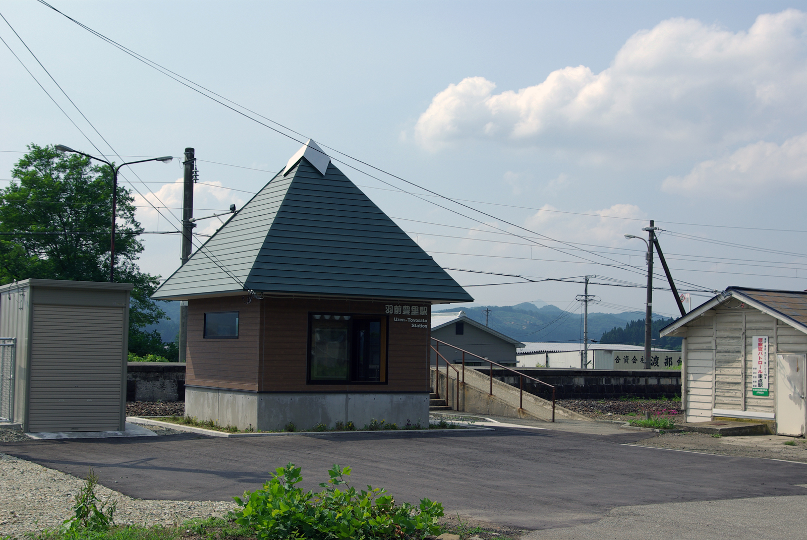 奥羽本線羽前豊里駅